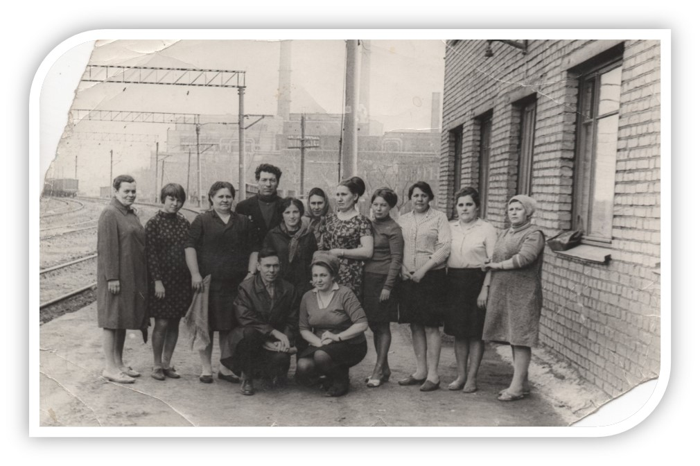 Коллектив одной из смен станции Обнорская